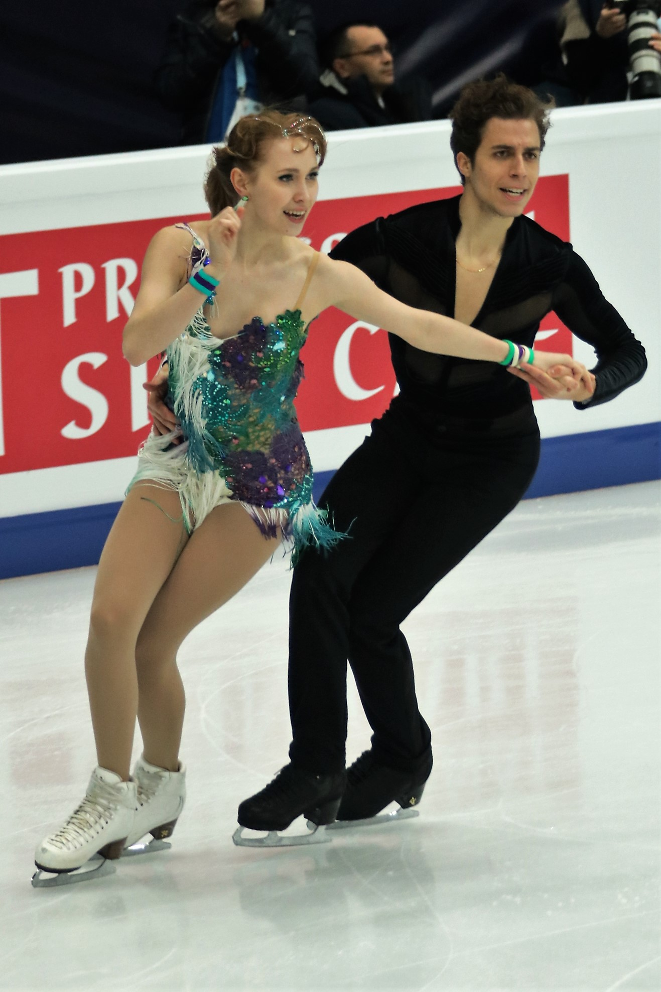 Анжелика Абашкина / Луис Таурон (Франция) на Чемпионате Европы по фигурному катанию 2018.